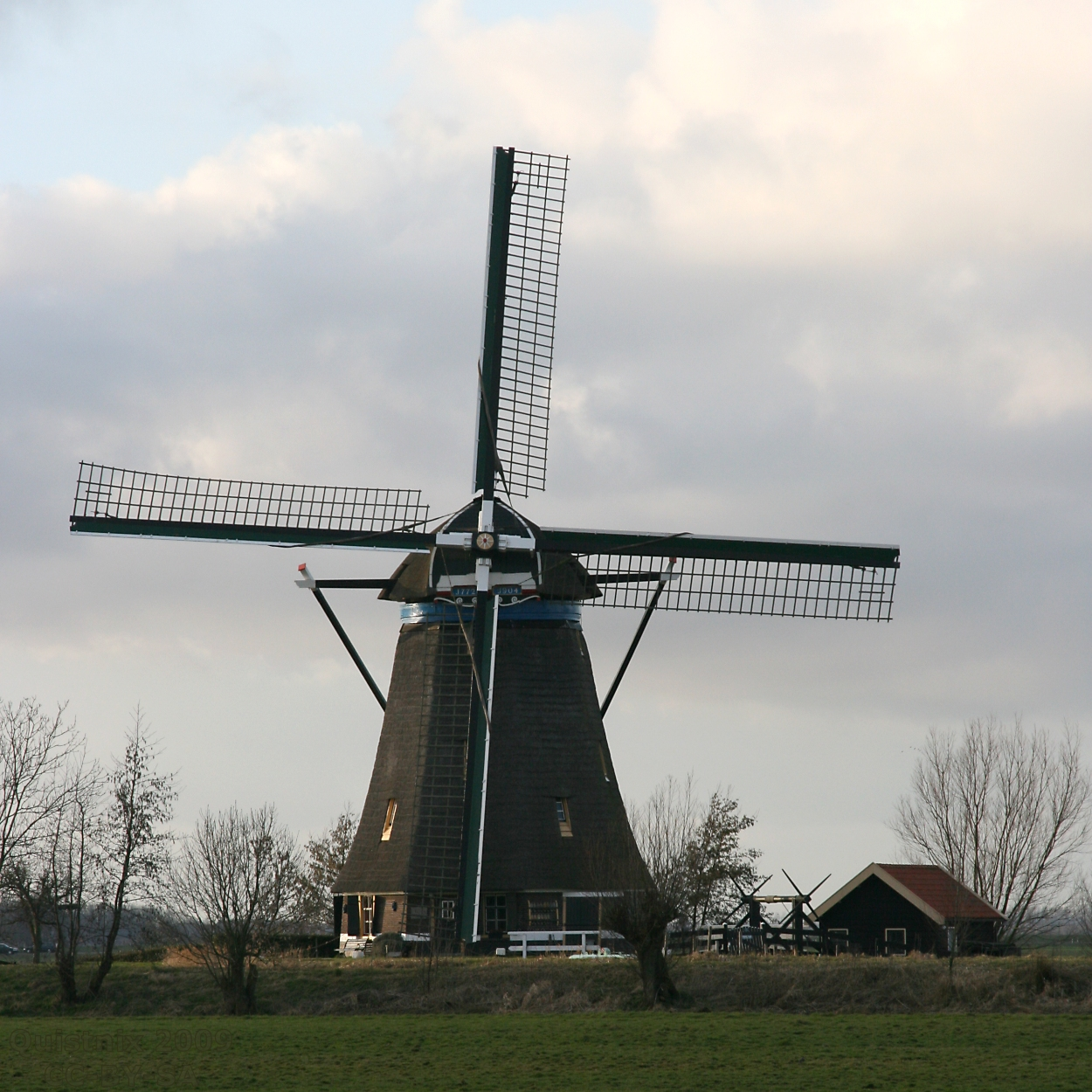 Rijpwetering: Blauwe Molen